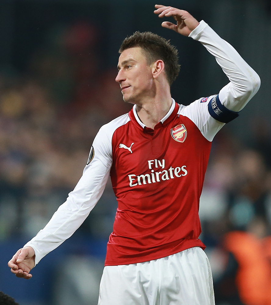 ЦСКА упустил победу над «Арсеналом» и покинул Лигу Европы